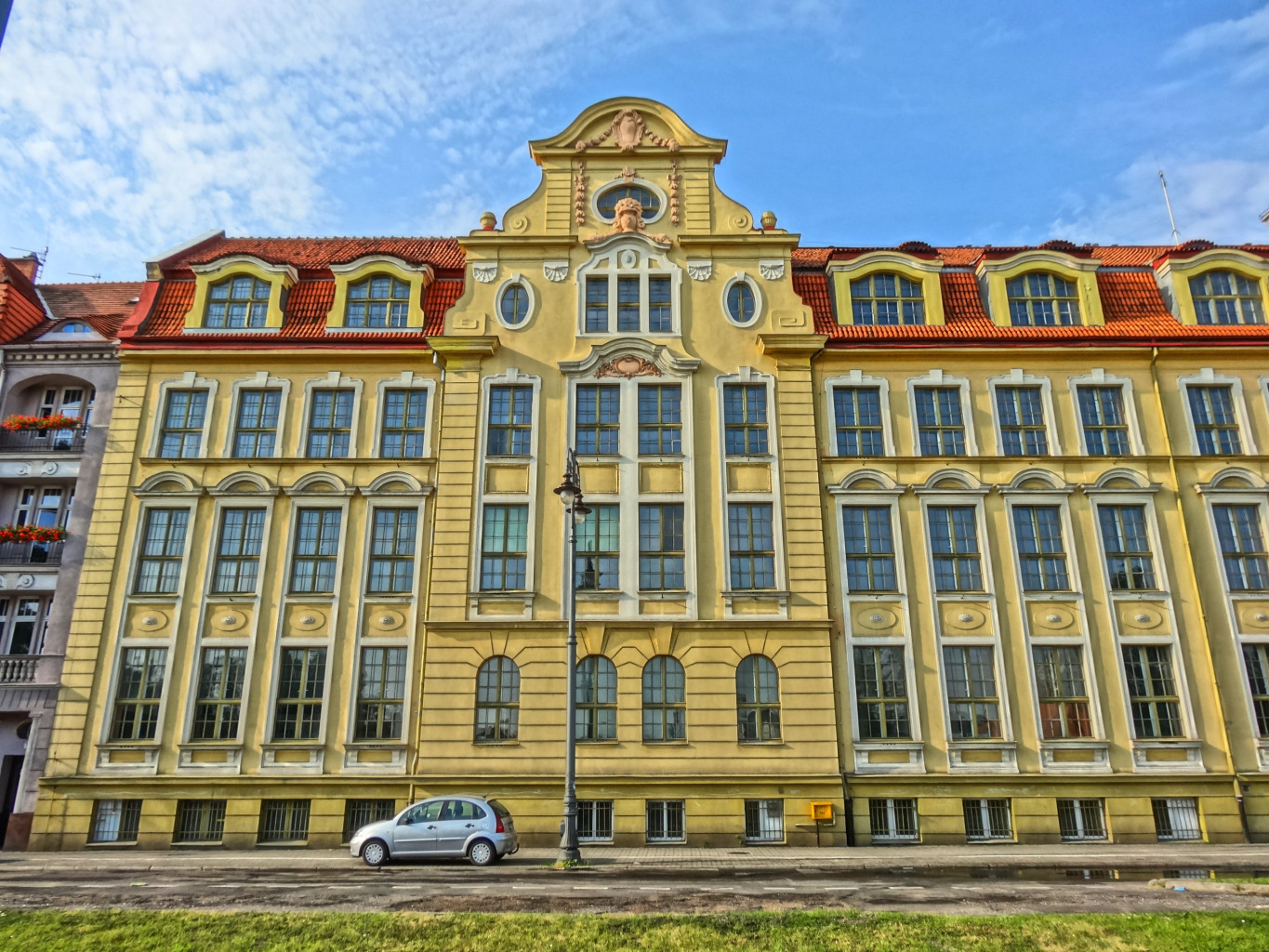 Dawna Szkoła Rzemiosła i Przemysłu Artystycznego, zbud. 1910-1911, obecnie Zespół Szkół Mechanicznych, Bydgoszcz ul. Świętej Trójcy 37